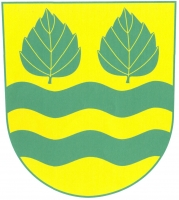 Březí nad Oslavou, znak. Ve zlatém štítě nad dvěma sníženými vlnitými břevny dva vztyčené březové listy, vše zelené.